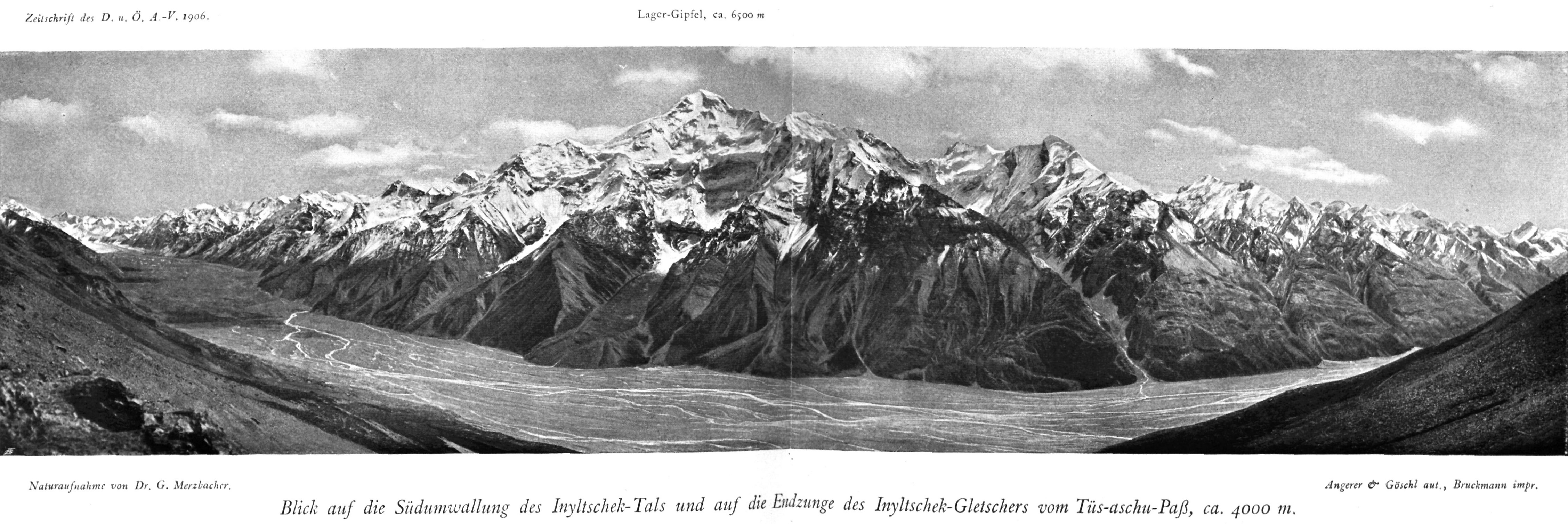 Blick auf die Südumwallung des Inyltschek-Tals und auf die Endzunge des Inyltschek-Gletschers vom Tüs-aschu-Paß ca 4000 m aus Zeitschrift des Deutschen und Oesterreichischen Alpenvereins 1906 Band 37